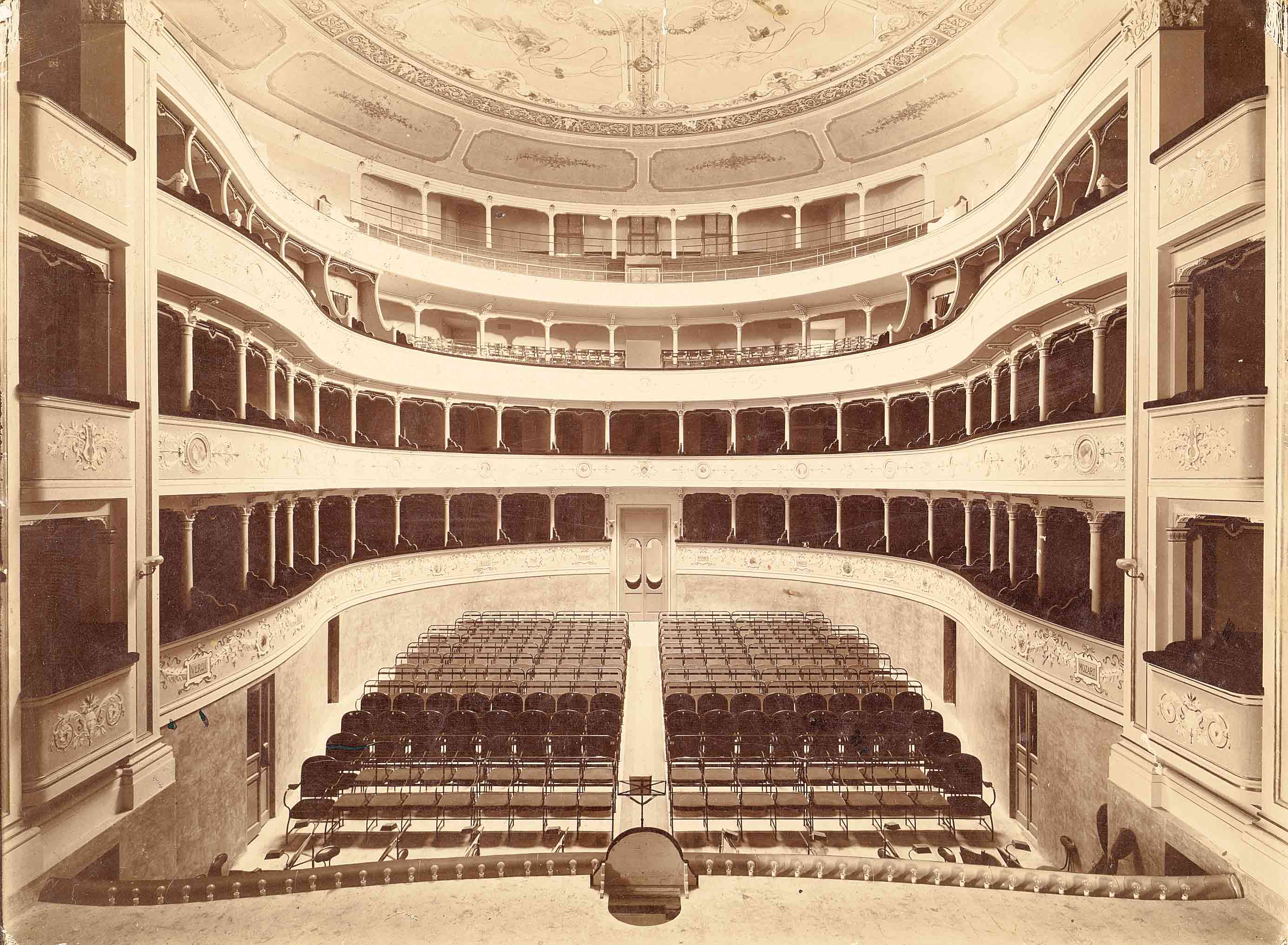 Interno del Teatro sociale di Mirandola (1906)